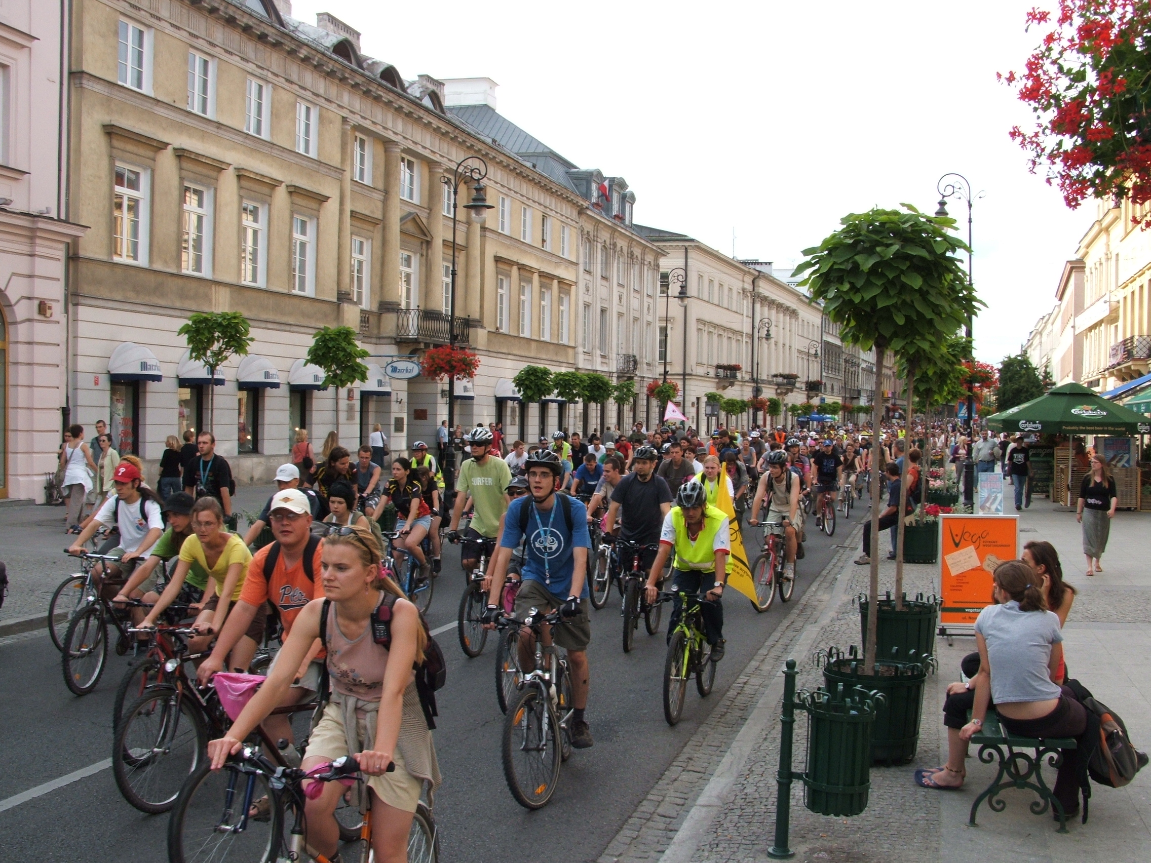 Warszawska Masa Krytyczna, Trakt Królewski